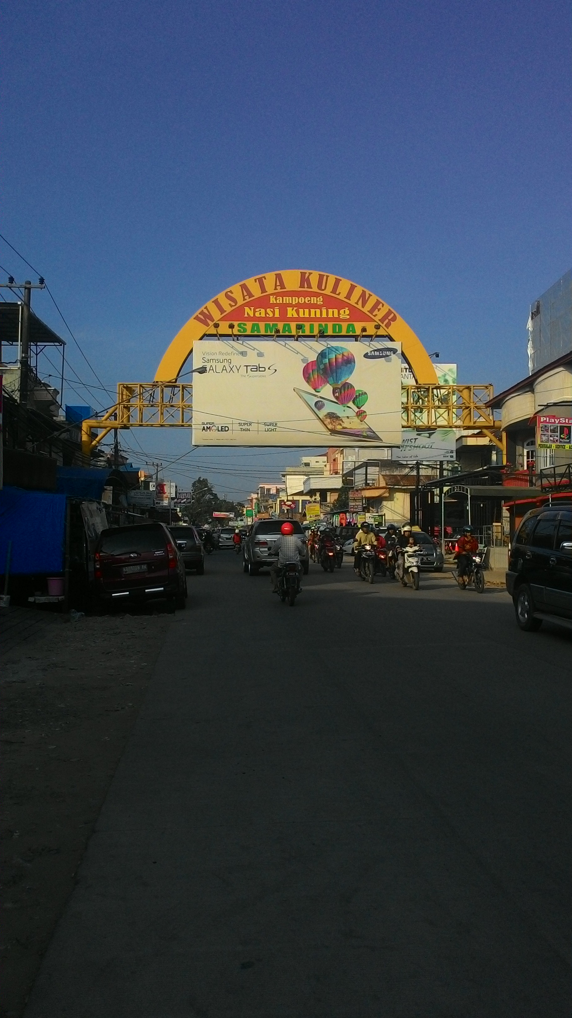 gapura kampung